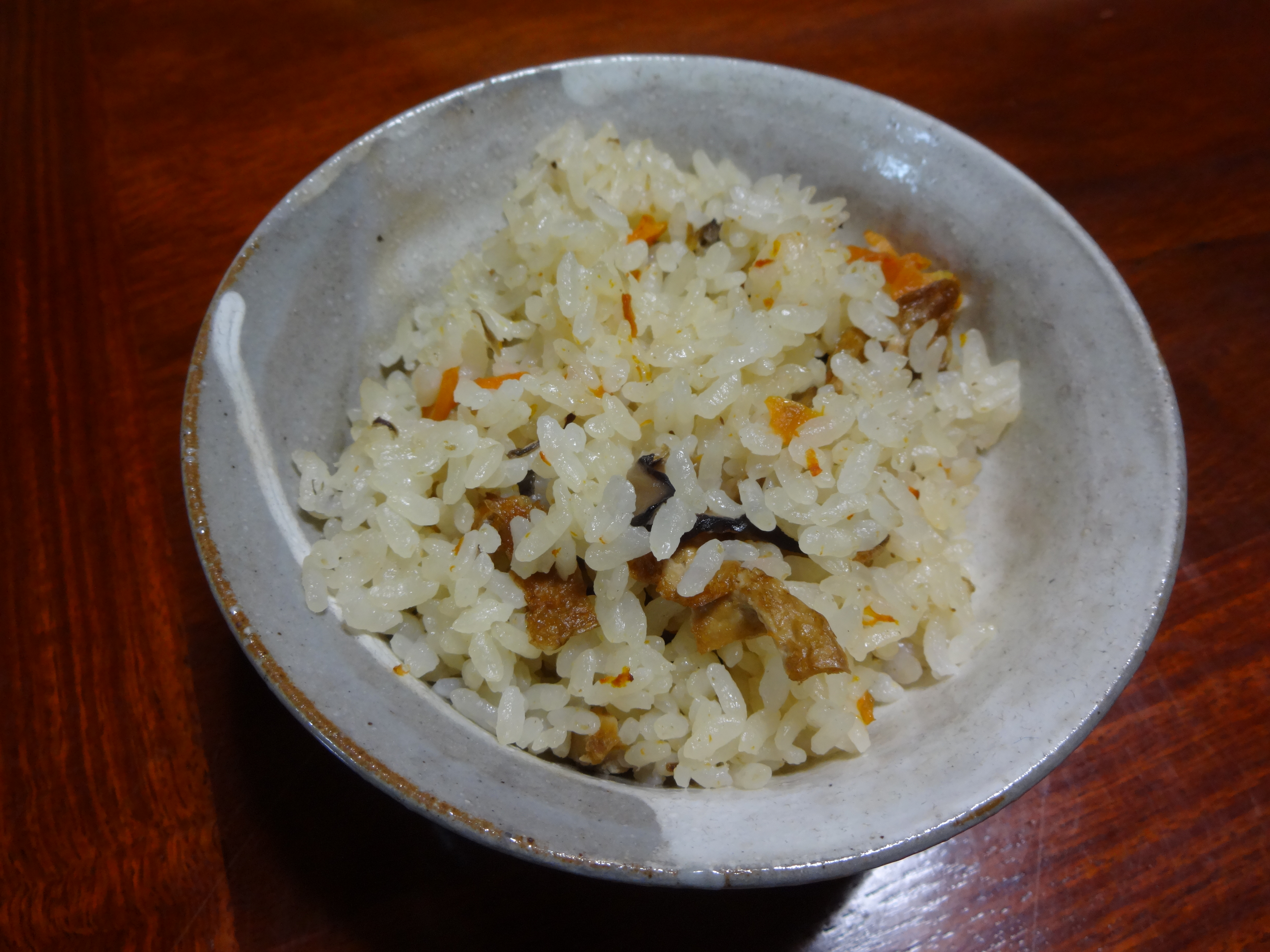 岐阜県各務原市の料理、金魚めし。